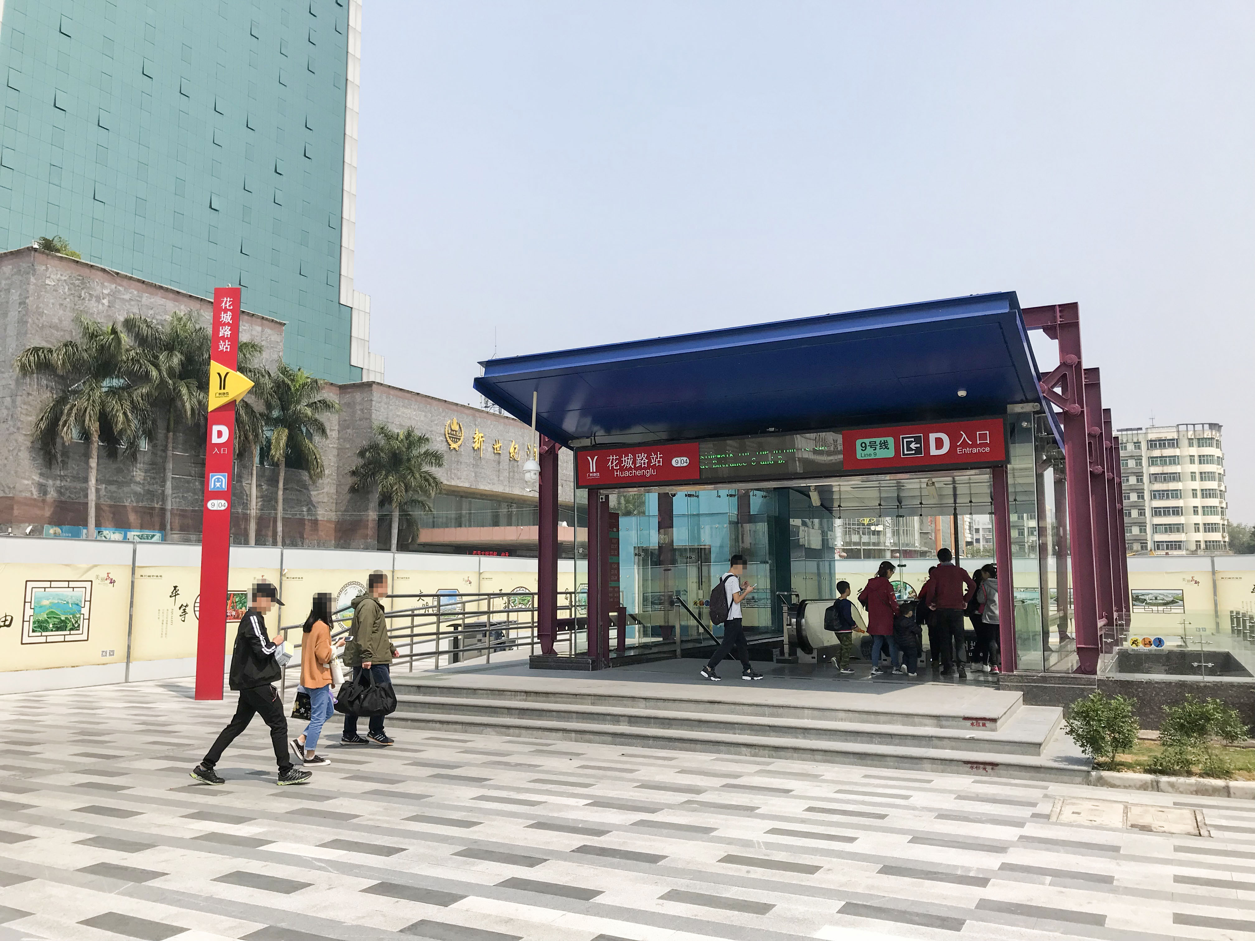 广州地铁花城路站